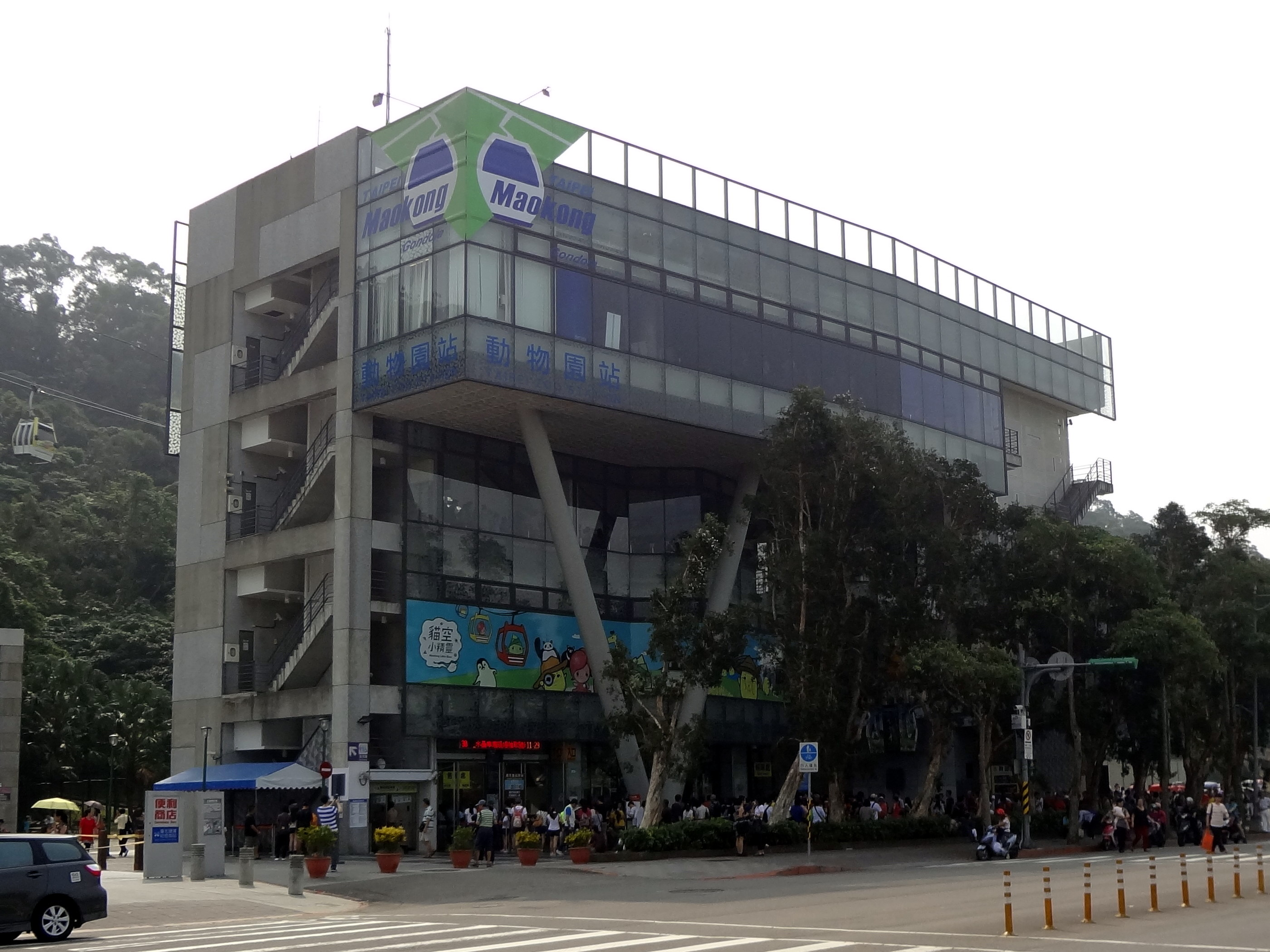 貓空纜車動物園站前方外觀。